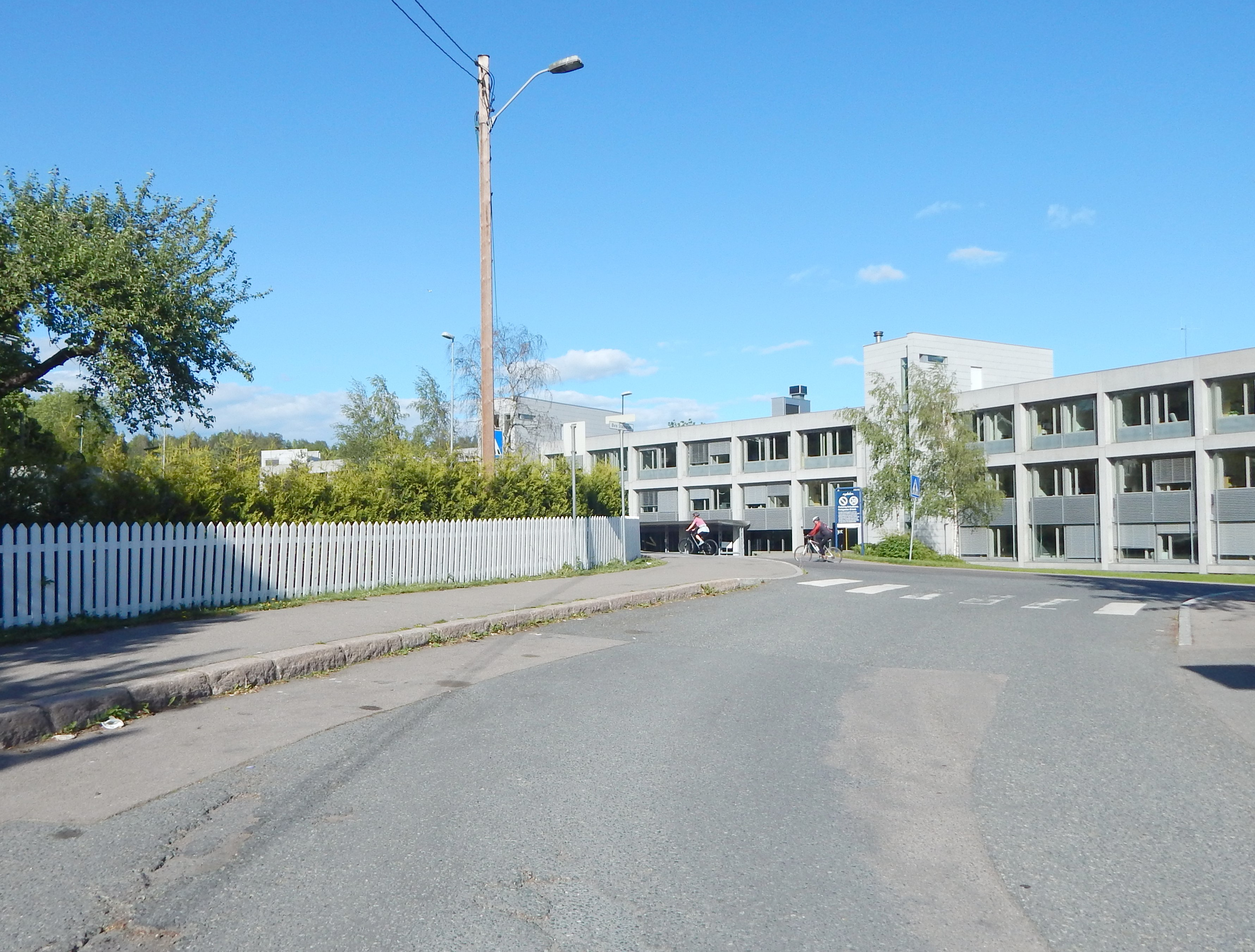 Øvre Stabburvei